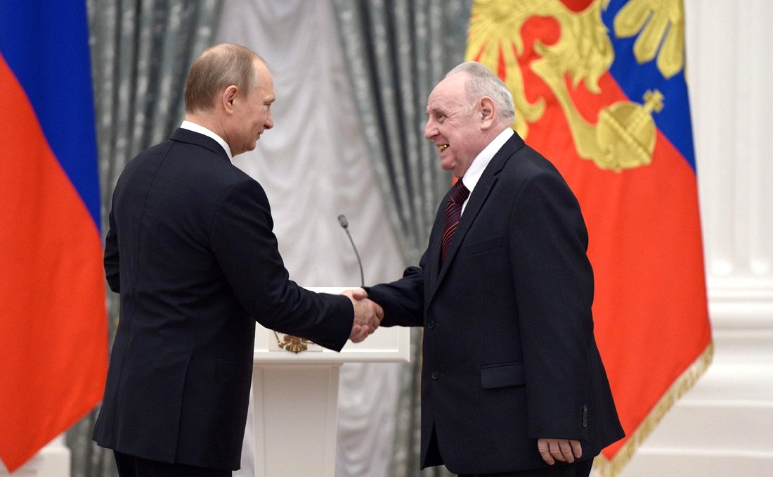 Москва, Кремль. 1 мая 2014 года. Церемония награждения Героев Труда Российской Федерации. Званием Героя Труда РФ награжден учитель Юрий Лепехин